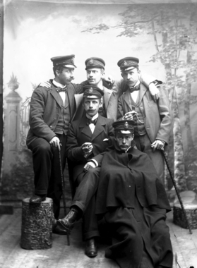 Motiv fem menn i atelier. Alle har skyggeluer med "S" i fronten. Avbildede personer: Gelein, Heiberg, Leire, Baard Hartvig Lund og Sjøstedt 1899 NM.F.009106-00004